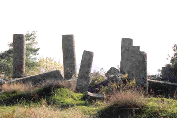 Labranda/Milas/Südwestliche Türkei, Bild Thomas Kutzli Januar 2003, GNU-FDL